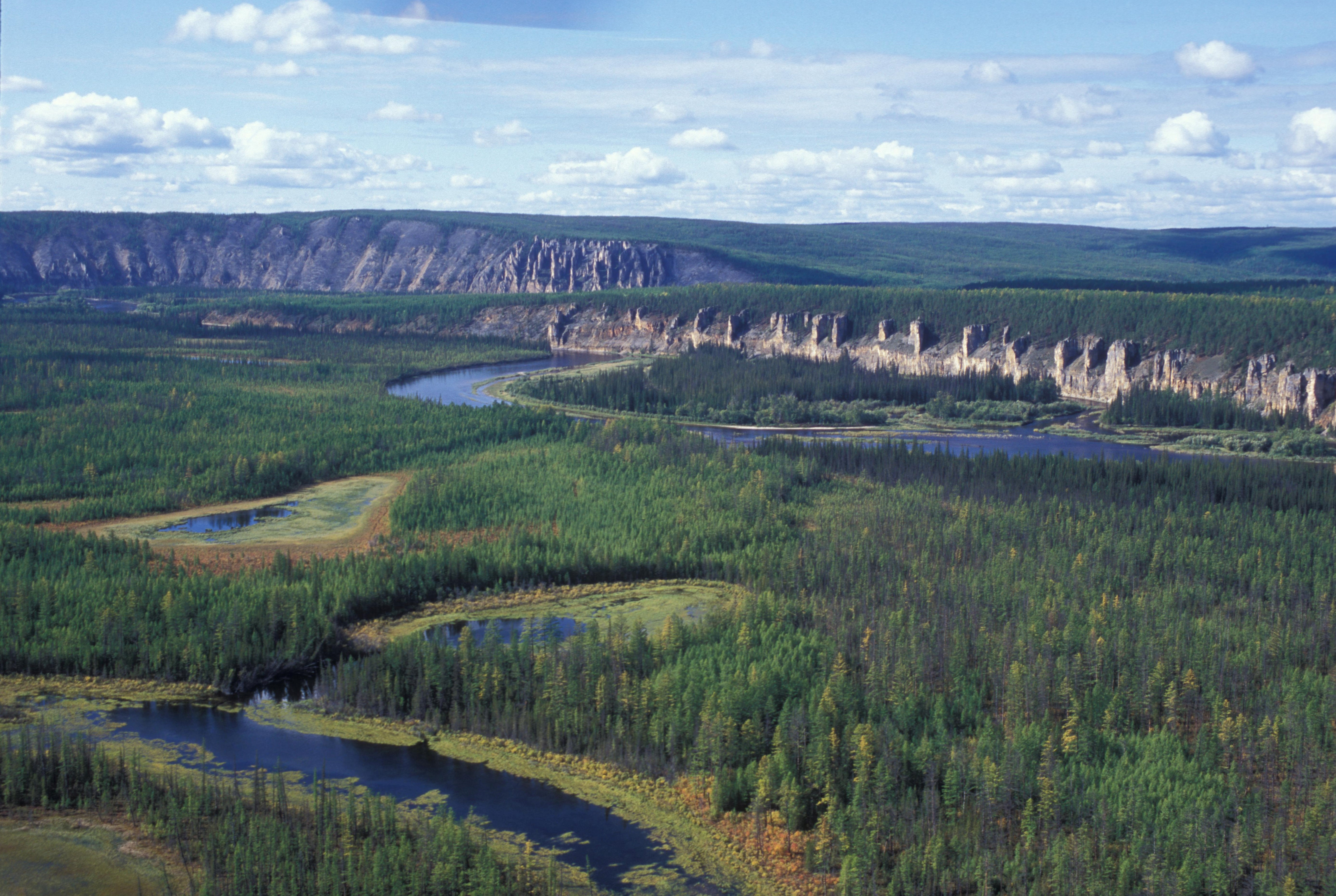 Ленские Столбы, Олёкминский район This image is related to the protected area of Russia number 1410189